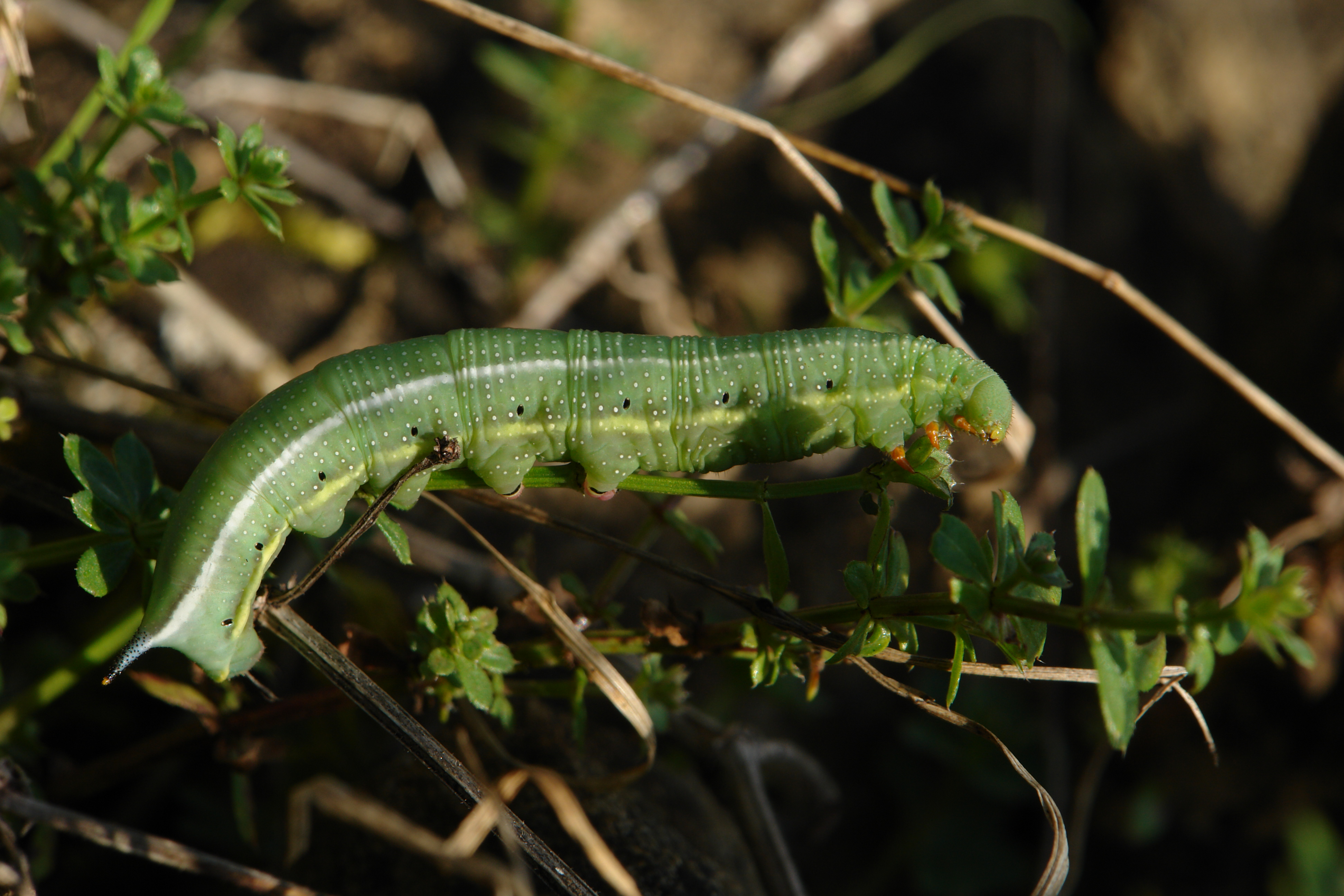 Macroglossum stellatarum (chenille)